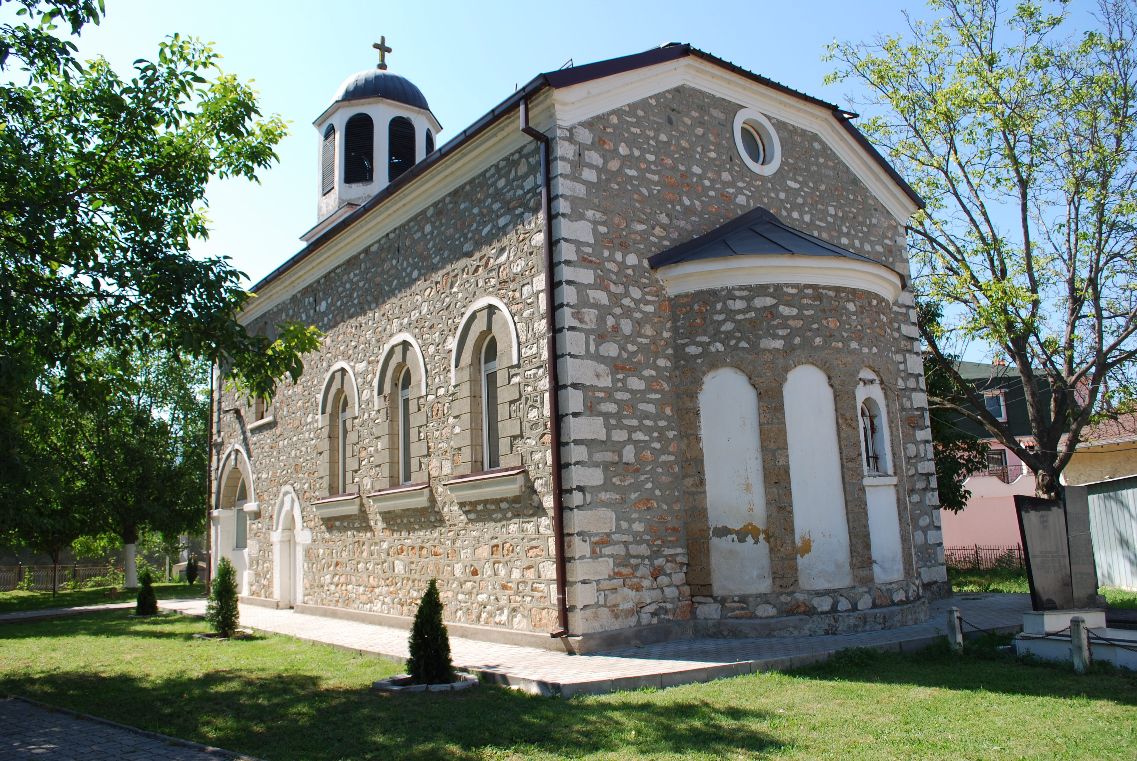 Црквата Св. Апостол Петар во Долна Бањица, Гостивар, Македонија